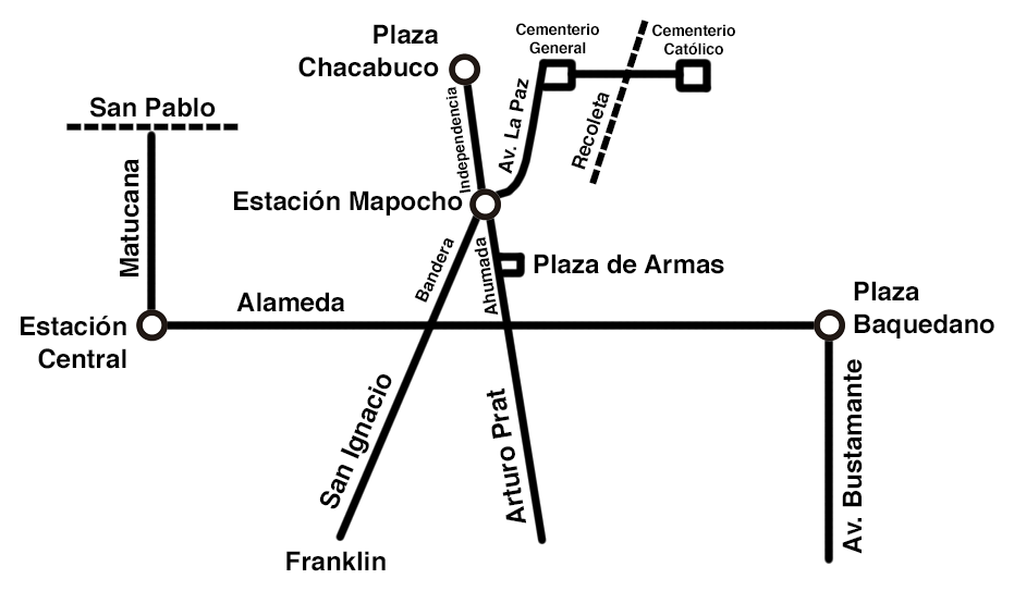 Diagrama del proyecto de metro para Santiago desarrollado por Luis Lagarrigue en 1925. Basado en croquis original existente en [1]